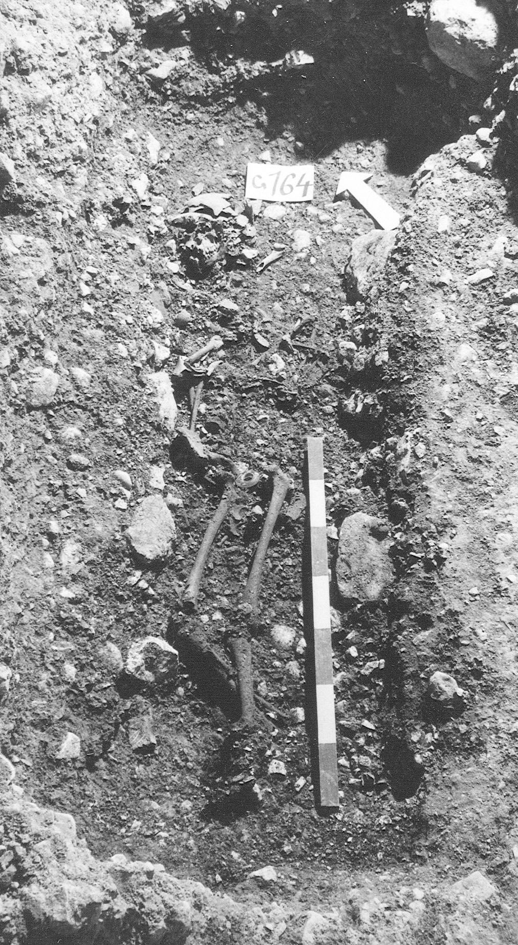 Bei archäologischen Grabungen unter der Stanser Pfarrkirche wurde 1984/85 ein Grab mit den Gebeinen eines Mädchens entdeckt. Der Fund datiert in die Eisenzeit (2 Jh. v. Chr.) und ist der bisher einzige archäologische Hinweis auf eine Besiedelung der Gegend zur keltischen Zeit. Foto: Staatsarchiv Nidwalden, Fachstelle für Archäologie.